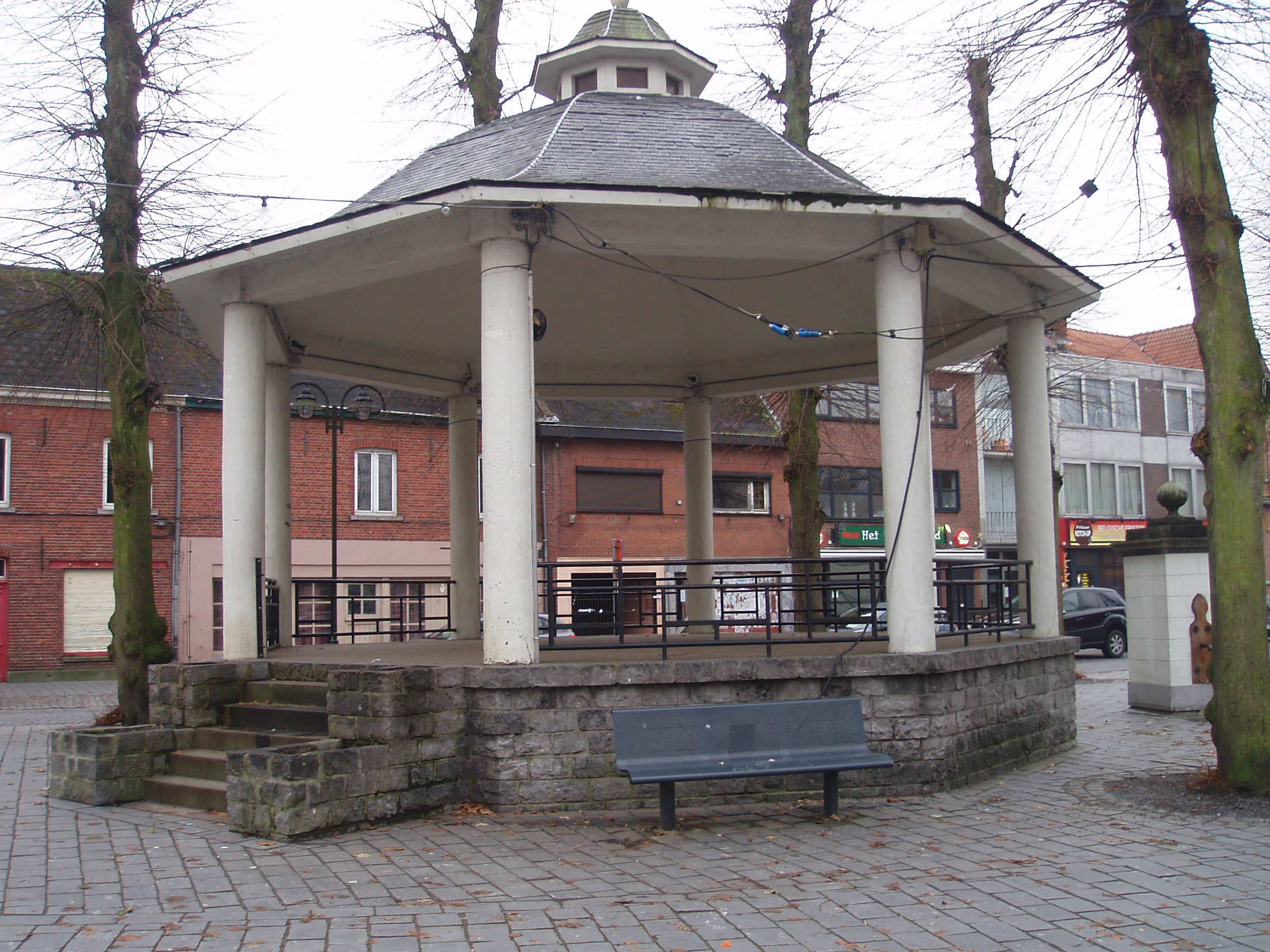 Kiosk Lommel